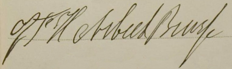 Подпись Хенка Асбек Брюссе